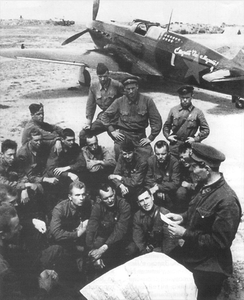 Проведение политинформации в 434-м истребительном авиаполку. В первом ряду слева направо: Герои Советского Союза старший лейтенант И.Ф. Голубин, капитан В.П. Бабков, лейтенант Н.А. Карначенок (посмертно), стоит комиссар полка батальонный комиссар В.Г. Стрельмащук. На заднем плане — истребитель Як-7Б с надписью на фюзеляже «Смерть за смерть!». Июль 1942 год